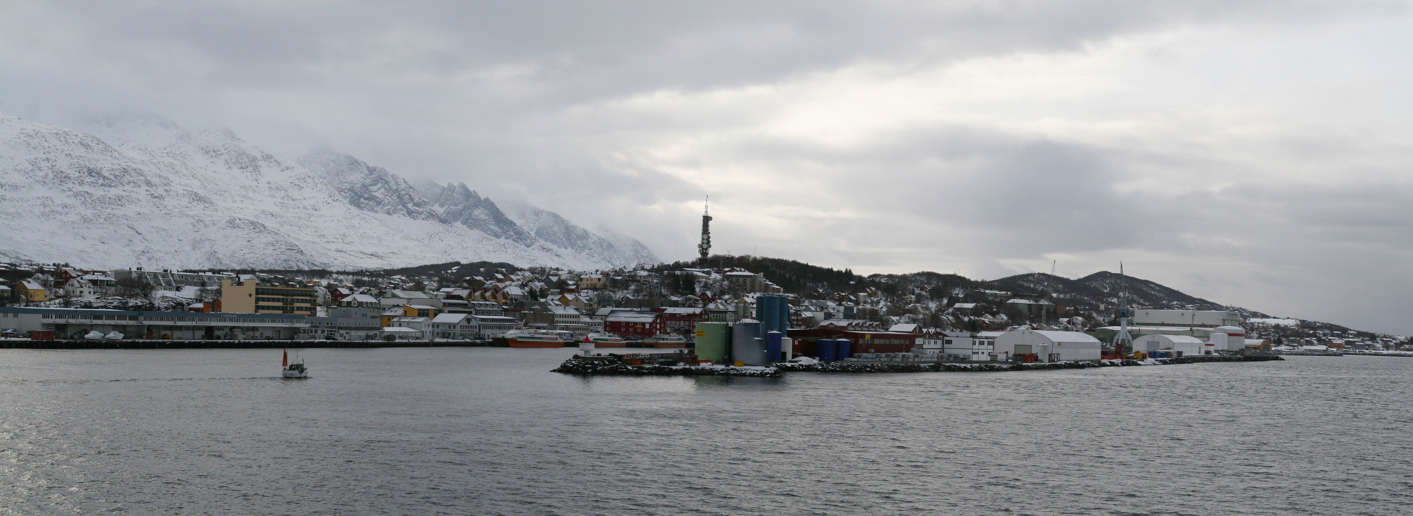 winter 2006-2007